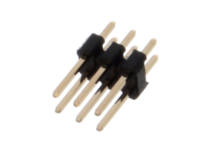 2 x 3 Pin Header.